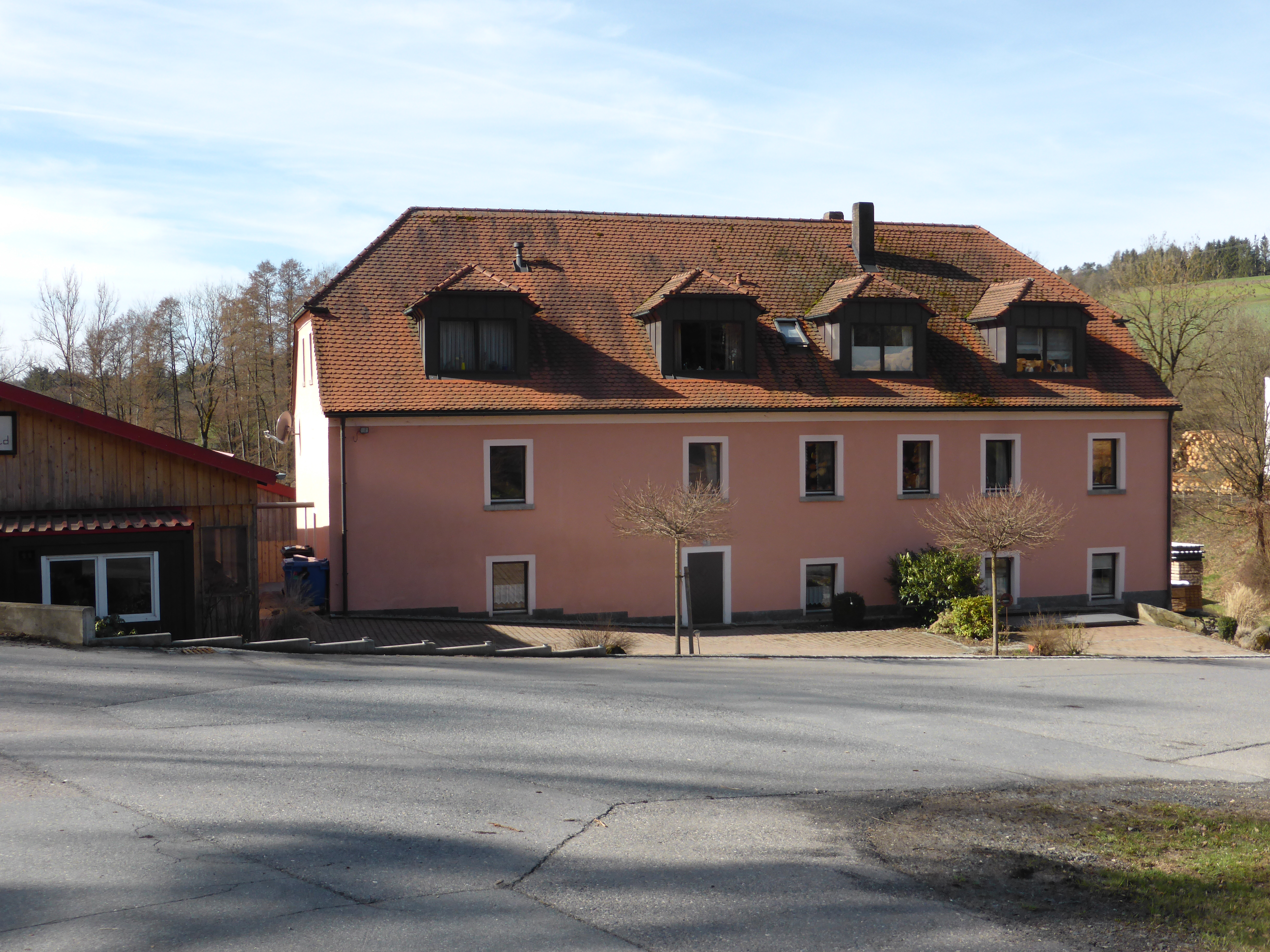 Hammermühle (Vohenstrauß)